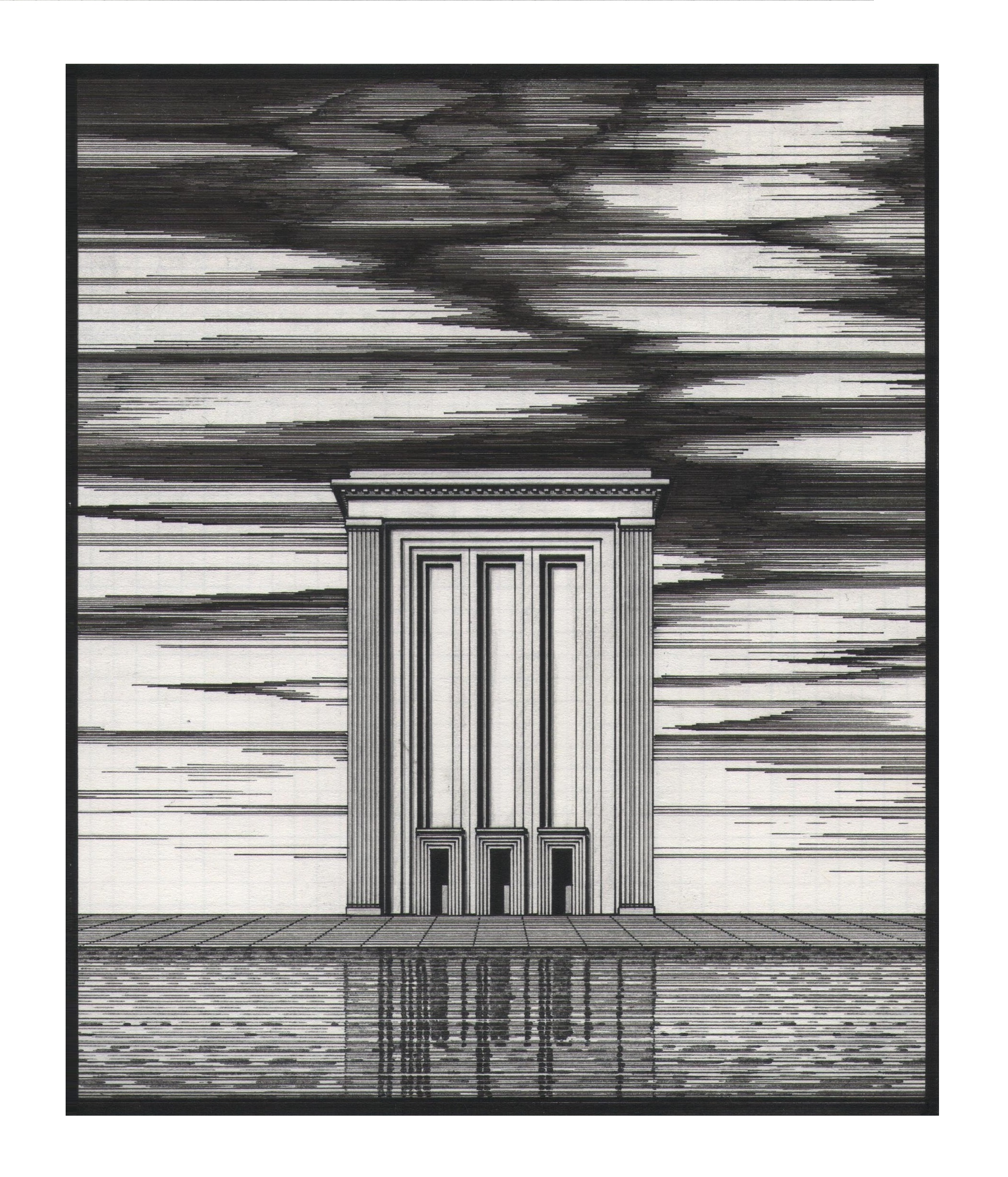 Arnaldo Dell'Ira (1903-1943), Tempio degli Eroi 1